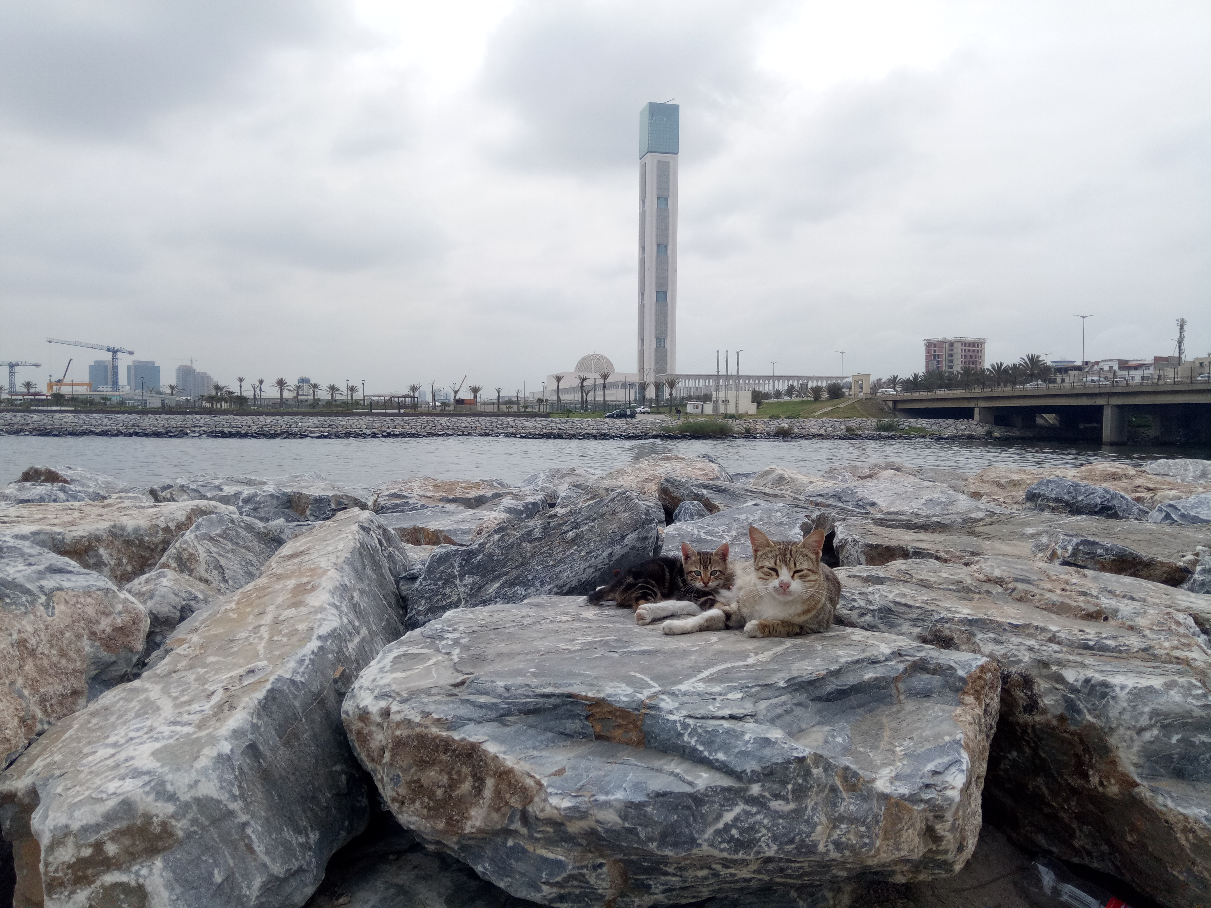 واد الحراش ،قطة و صغيرها و فالخلفية مسجد الجزائر الأعظم